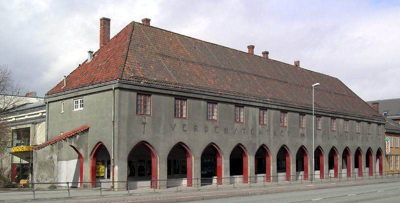 Prinsen kinosenter, Prinsens gate, Trondheim. Bygd 1911 (arkitekt H.Kunig); nåværende fasade ved Claus Hjelte, 1915.